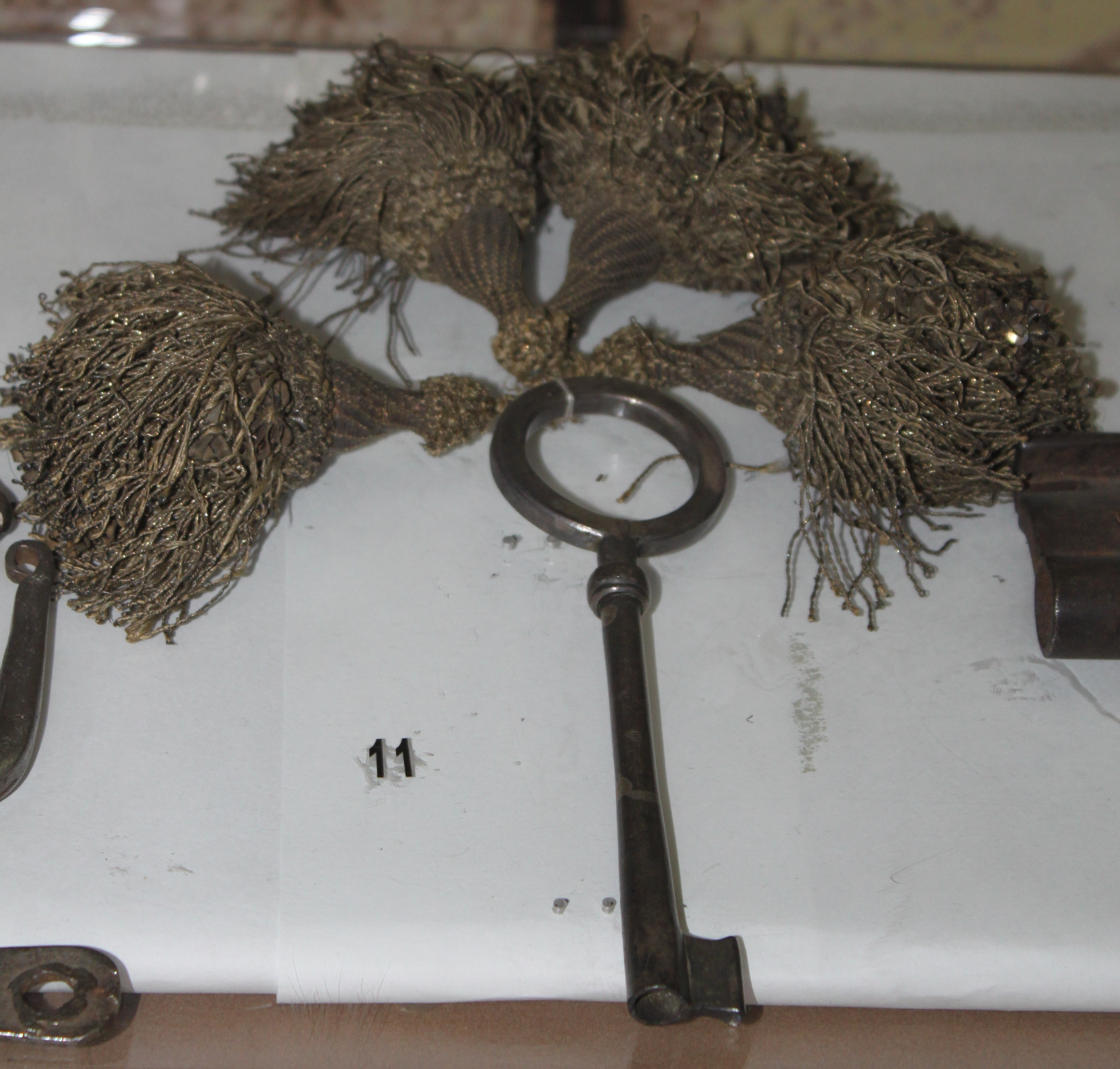 Şuşa qalasının açarı